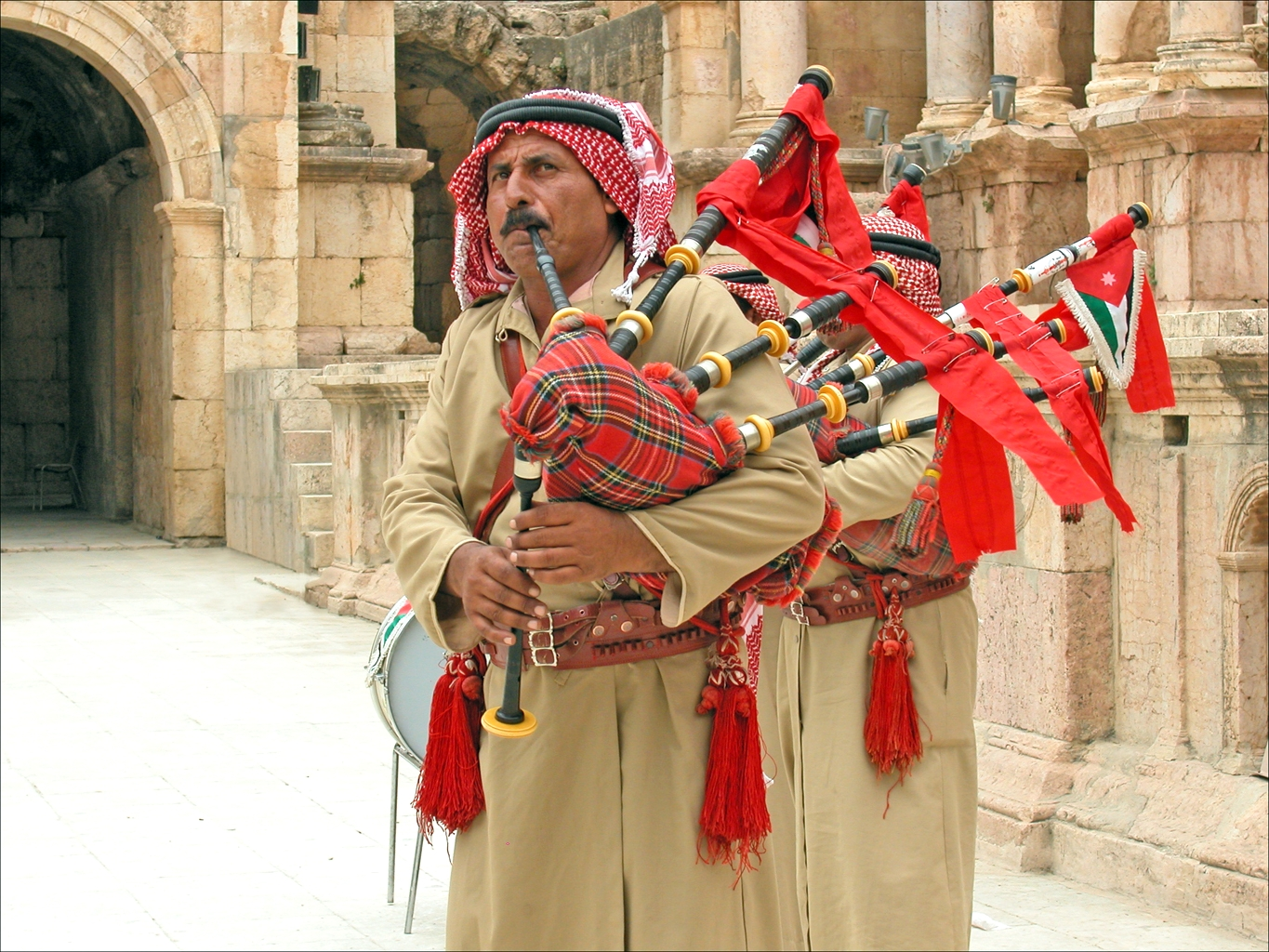 Anciens militaires jordaniens jouant de la cornemuse dans le théâtre romain sud de Jerash. La pratique de cet instrument est un héritage de l'occupation anglaise et des régiments écossais. Site de l'auteur (2005) sur la Jordanie Pour les passionnés de cornemuses, voir le site sur ce sujet réalisé sous la direction de Marie-Barbara Le Gonidec, ethnomusicologue du ministère de la culture